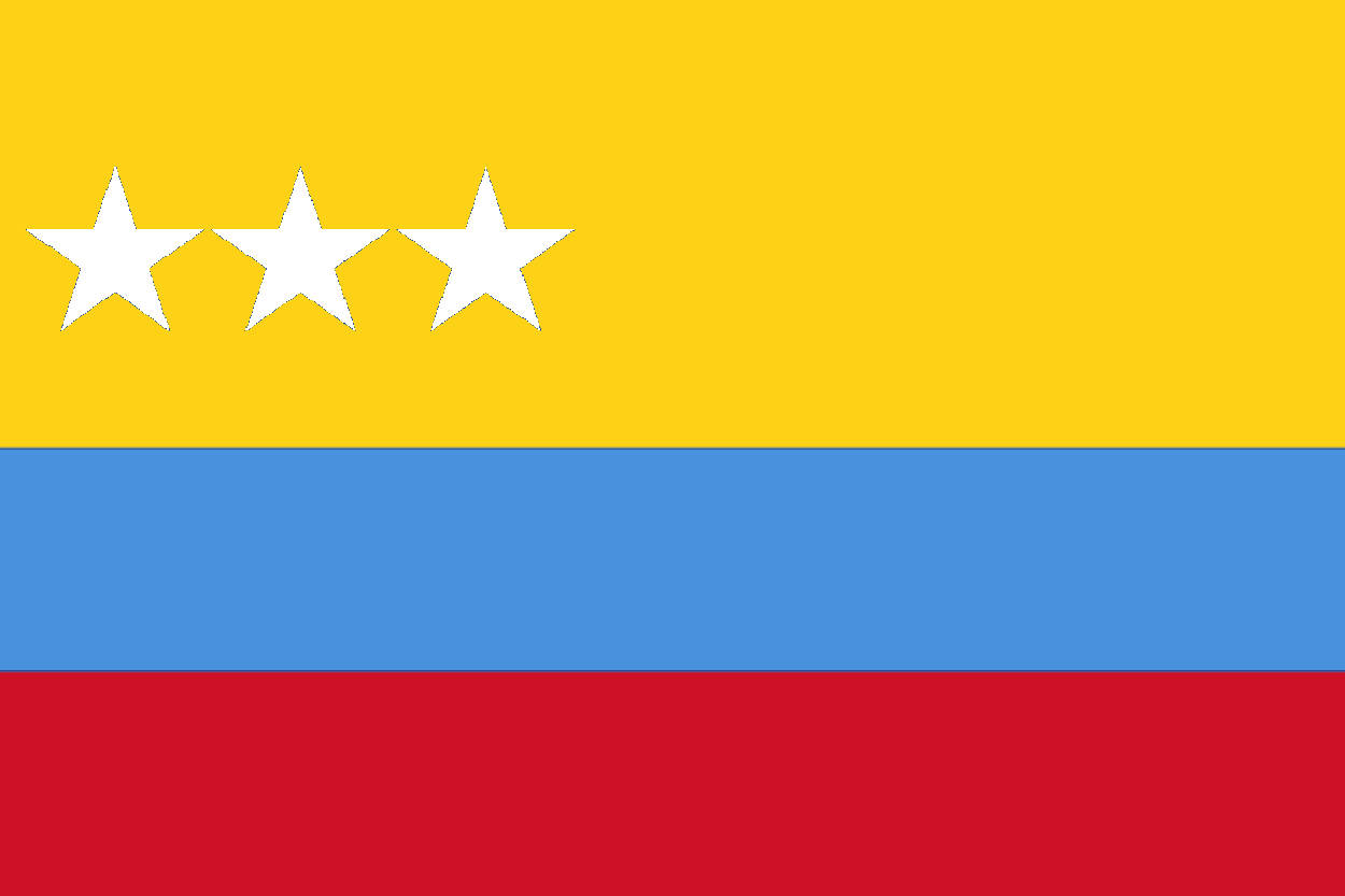 Bandera de la Gran Colombia entre 1819 y 1821. Es probable que haya sido una propuesta.